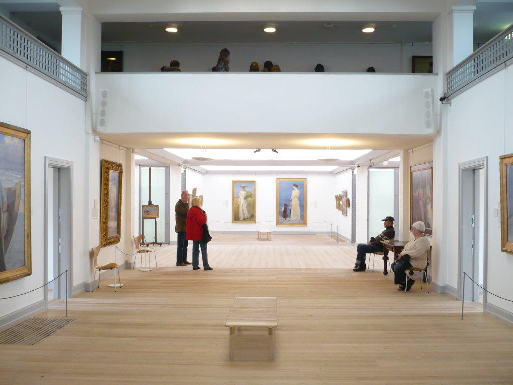 Interior from Skagens Museum in Skagen, Denmark